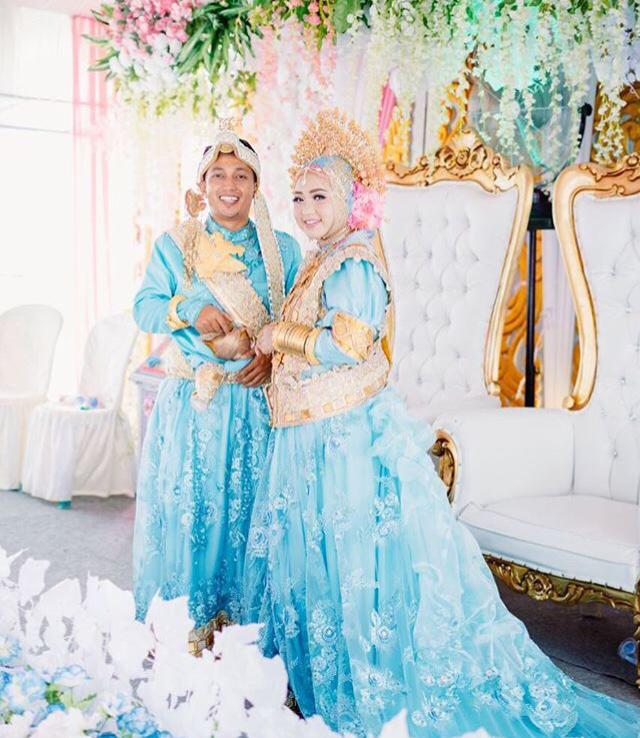 Pakaian adat suku Bugis - Makassar, yang biasa dikenakan ketika pesta pernikahan